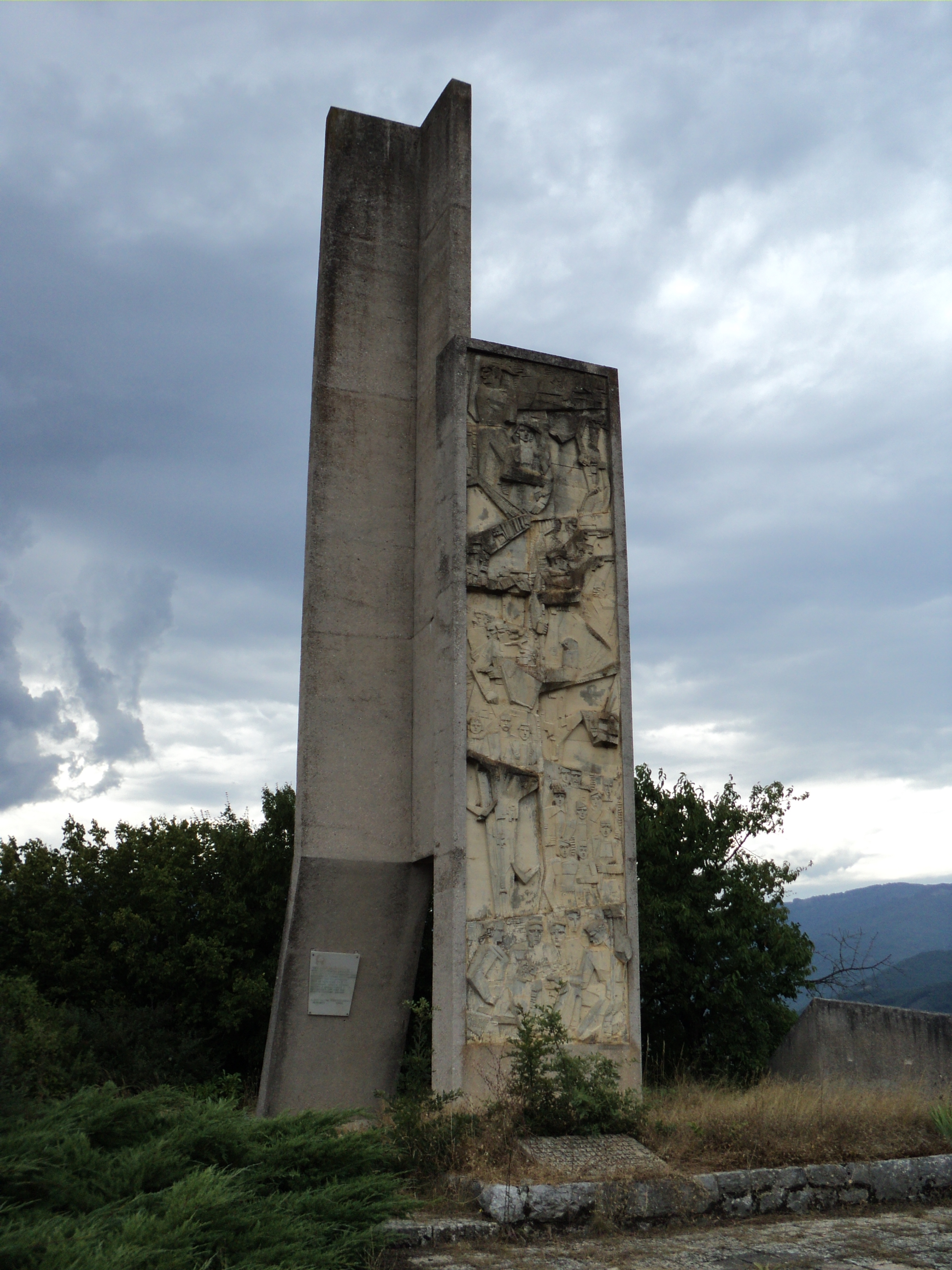 Spomenik palim borcima i partizanima u blizini sela Belčišta; autor: Jordan Grabuloski. Avgust 2011.